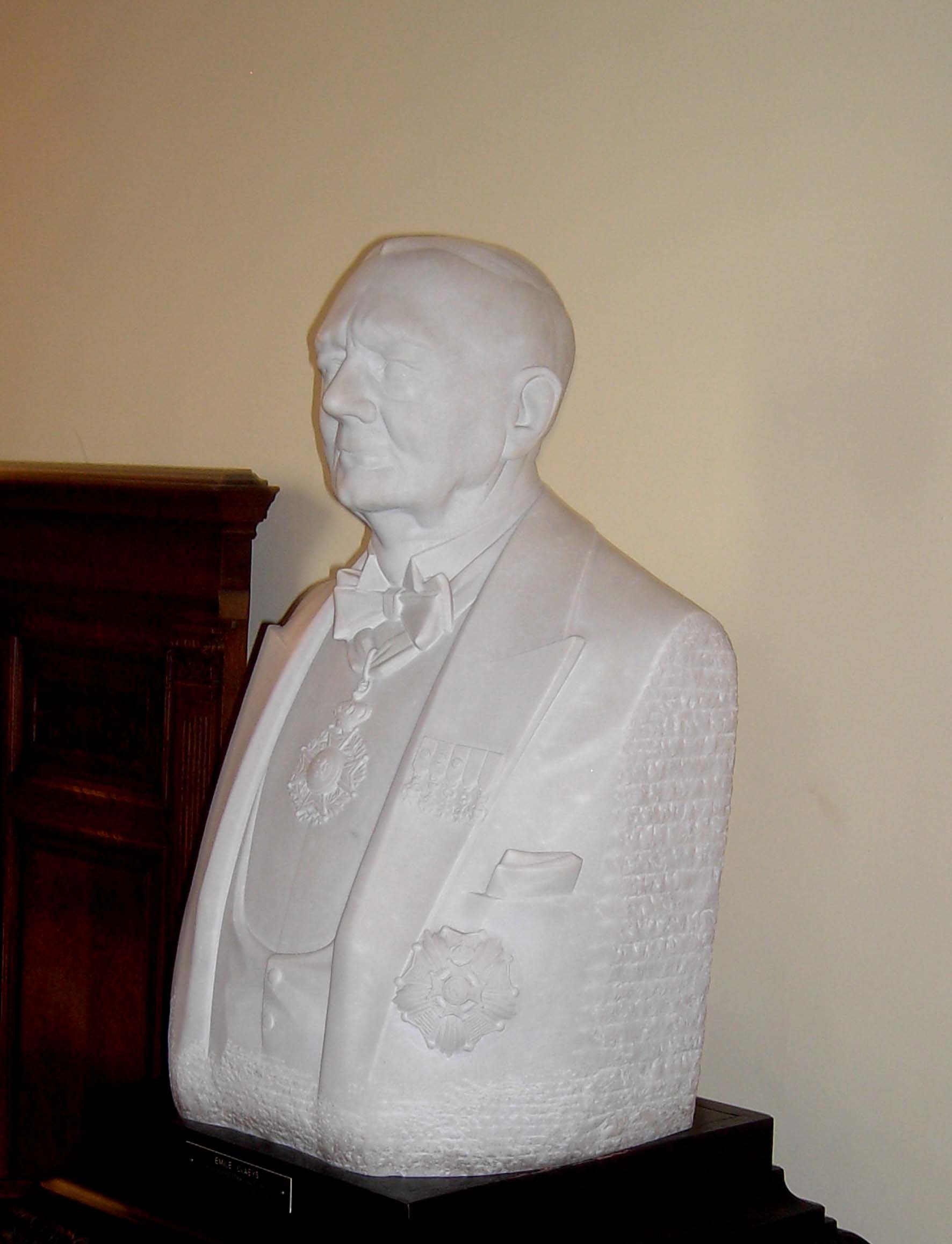 Emile Claeys - burgemeester van Gent in België